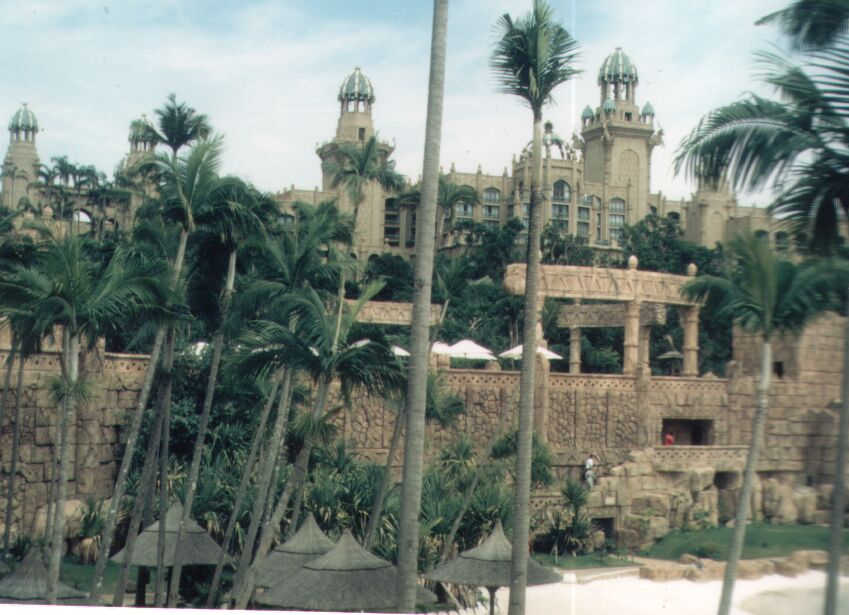 Suncity (Südafrika)